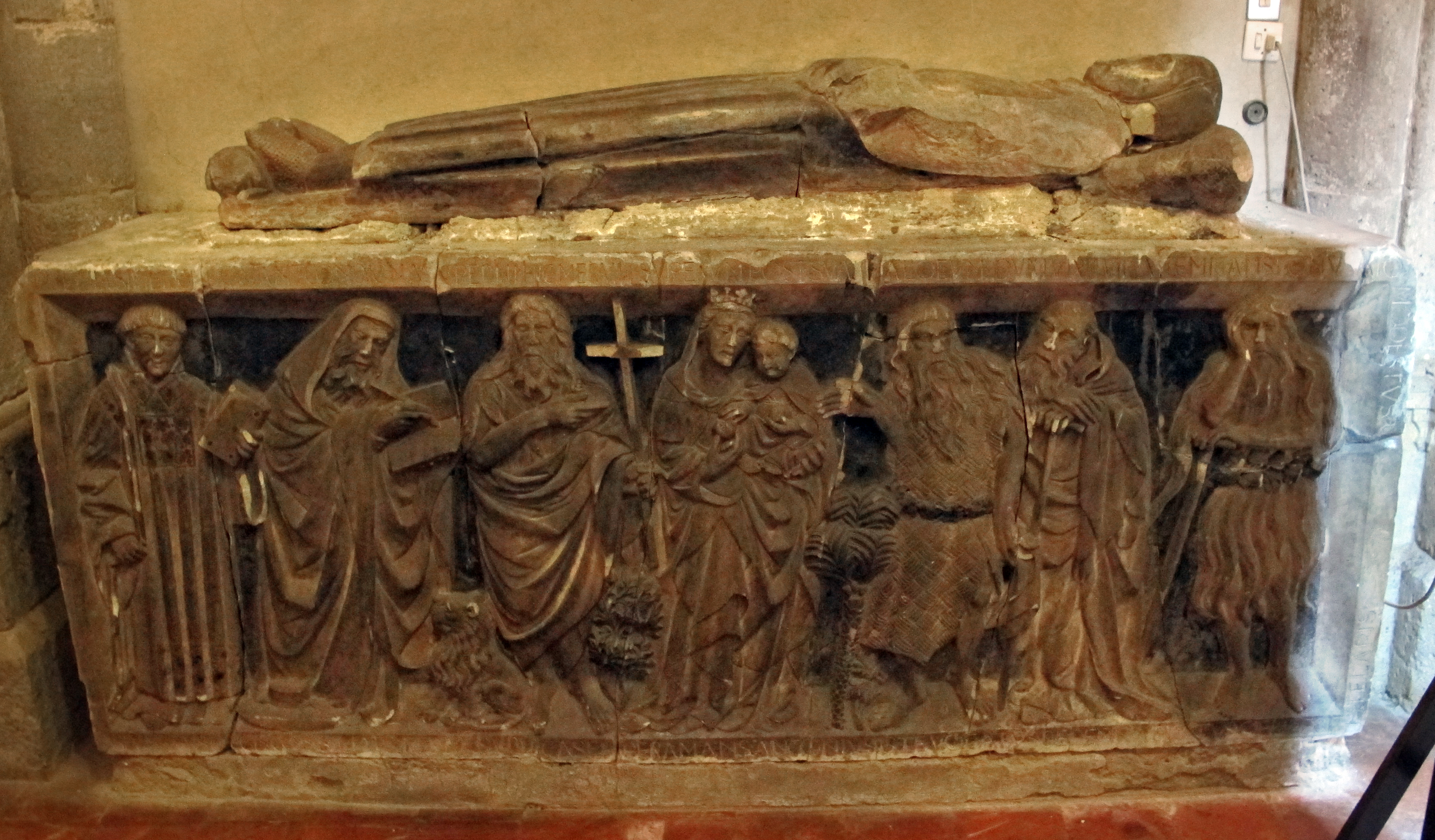 Santa Chiara (Napoli)